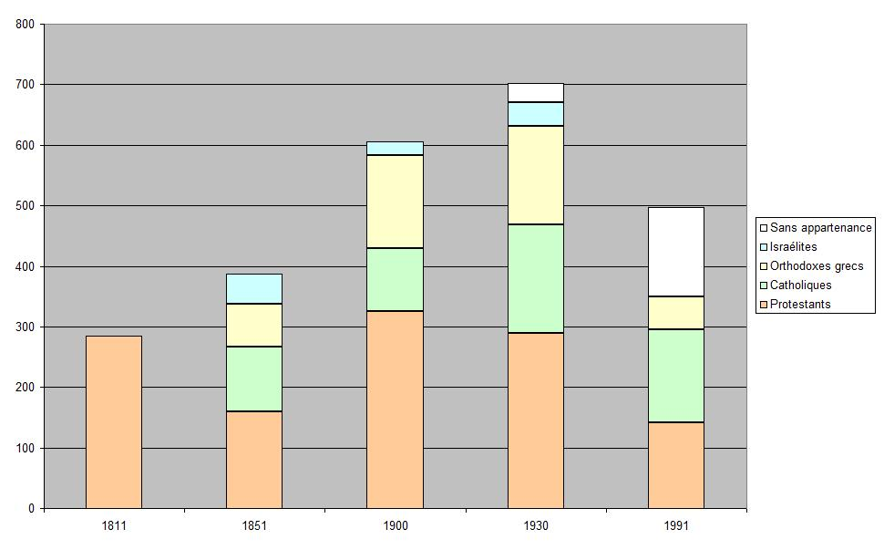 Composition religieuse de la population de Malá Tŕňa (Slovaquie).